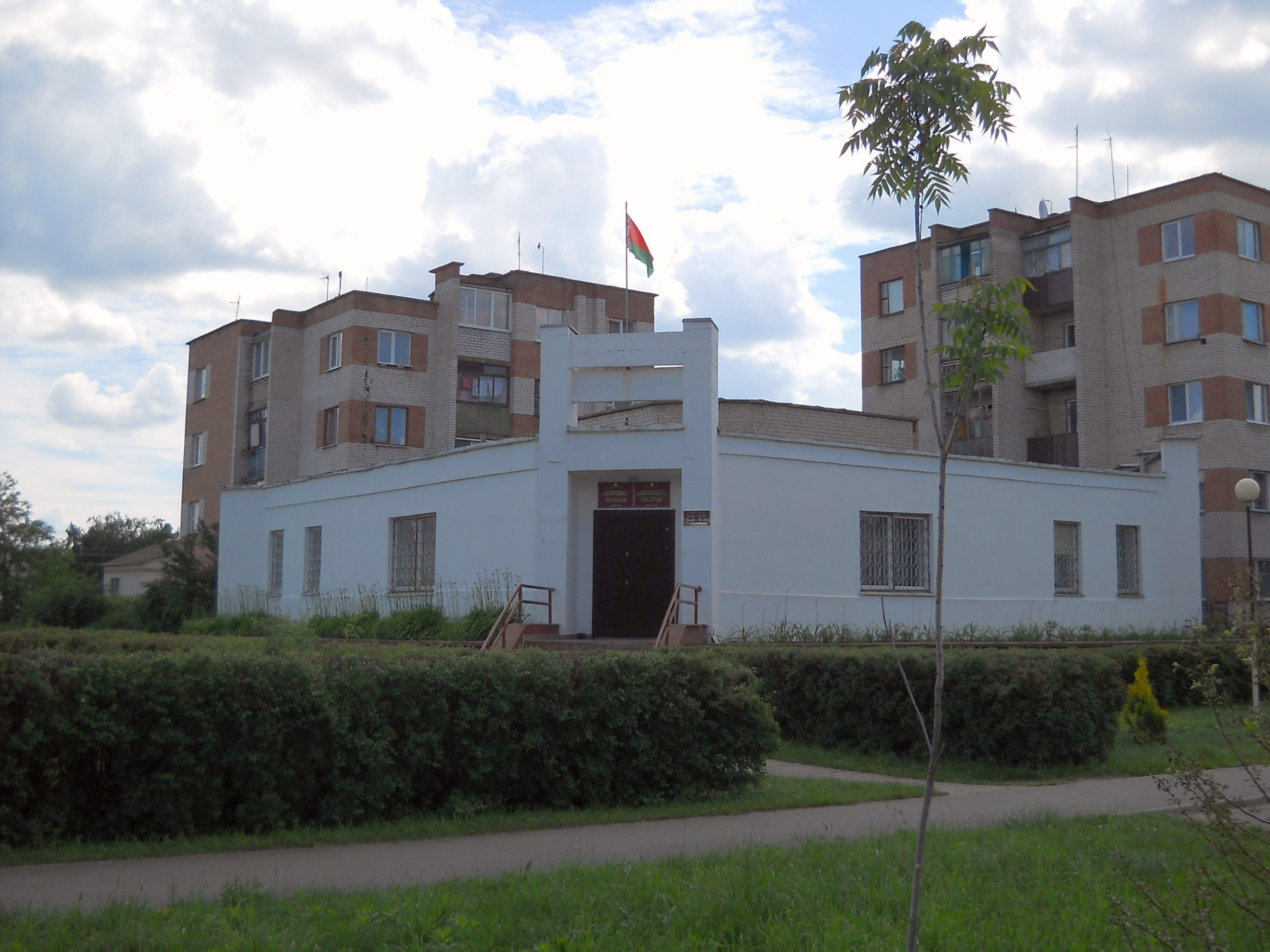 Здание Мотыкальского сельского исполнительного комитета и Мотыкальского сельского Совета депутатов